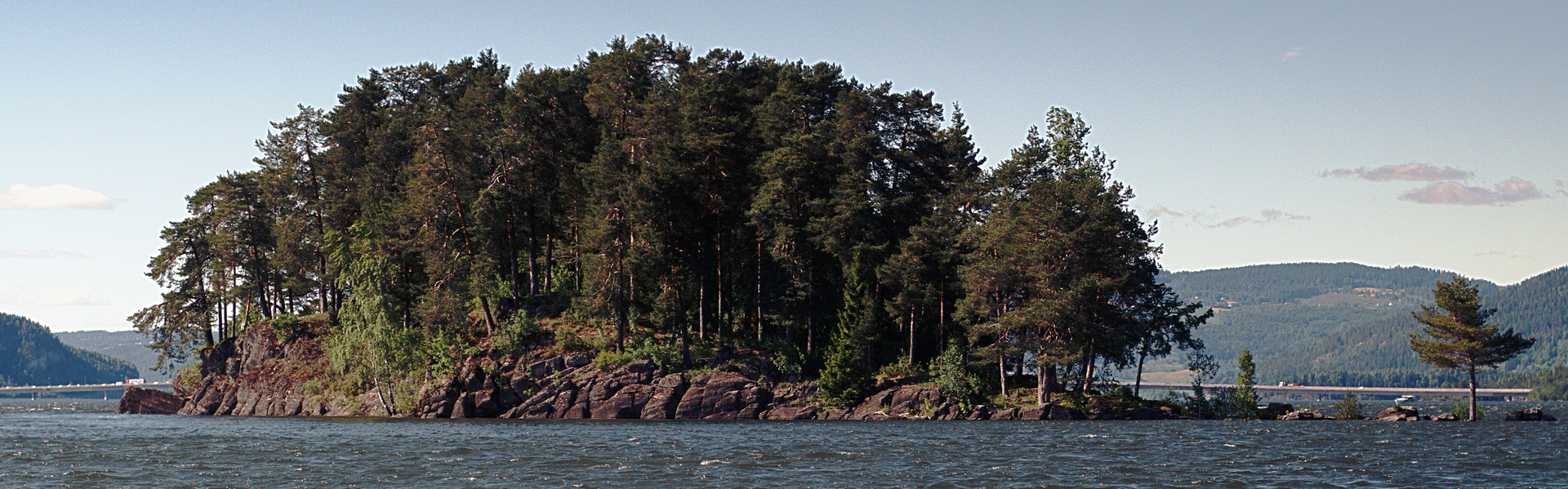 Steinsholmen fra syd, mjøsbroen bak